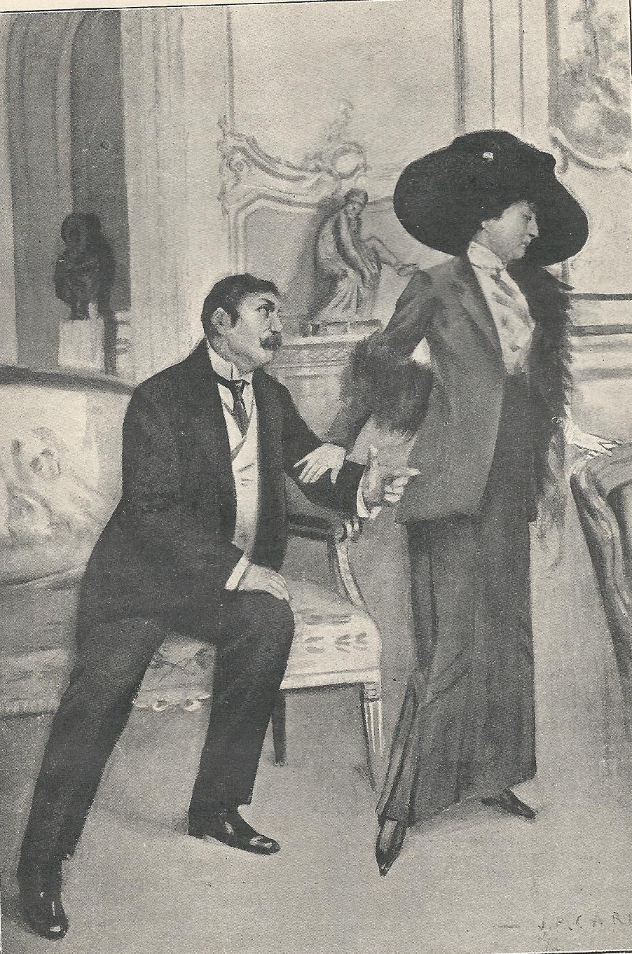 Illustration du "Foyer", comédie d'Octave Mirbeau, par J.-P. Carré. Éditions Arthème Fayard, collection « Modern-Théâtre », s. d. [1913]